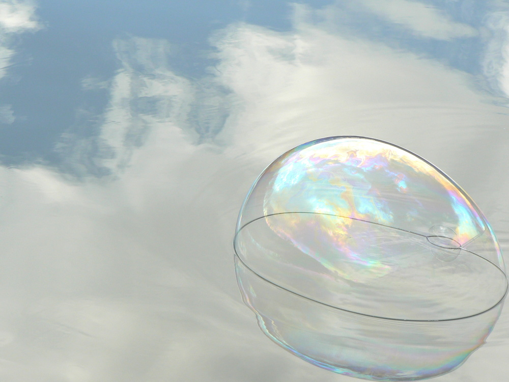 シャボン玉, Soap bubble